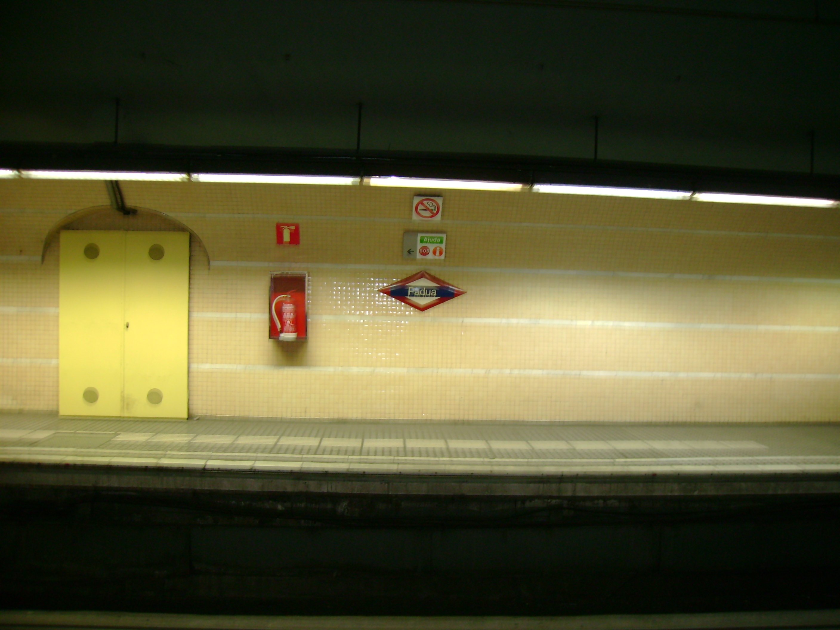 Foto capturada per la meva càmara a l'estació de Pàdua (Metro de Barcelona).